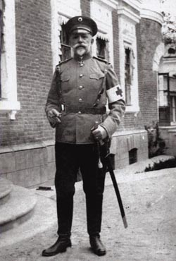 Князь Иван Викторович Барятинский в 1914 году.